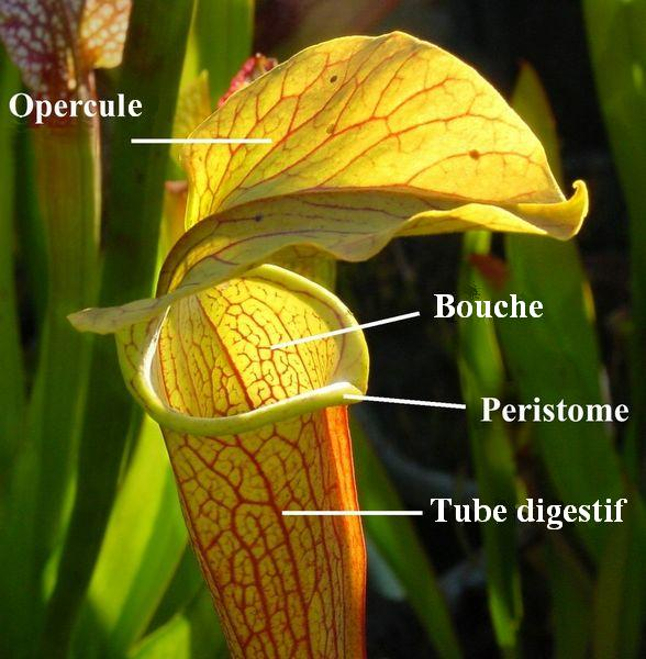 Schema_montrant_Péristome